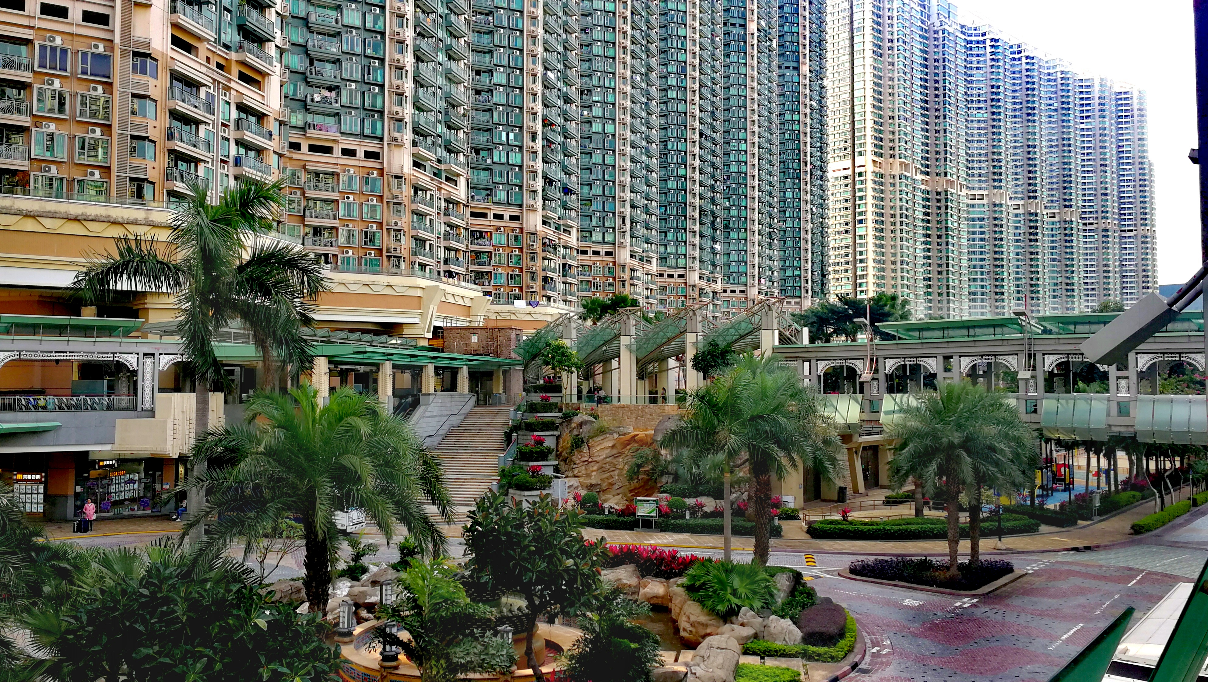 映灣園外觀